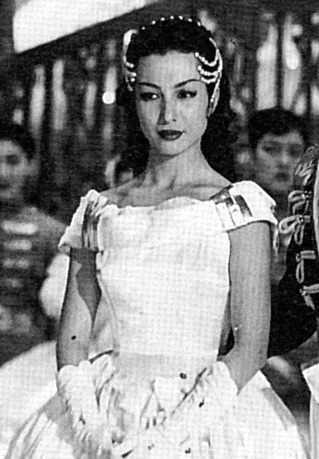 宝塚歌劇団による「君の名は ワルシャワの恋の物語」舞台写真。新珠三千代（Michiyo Aratama）